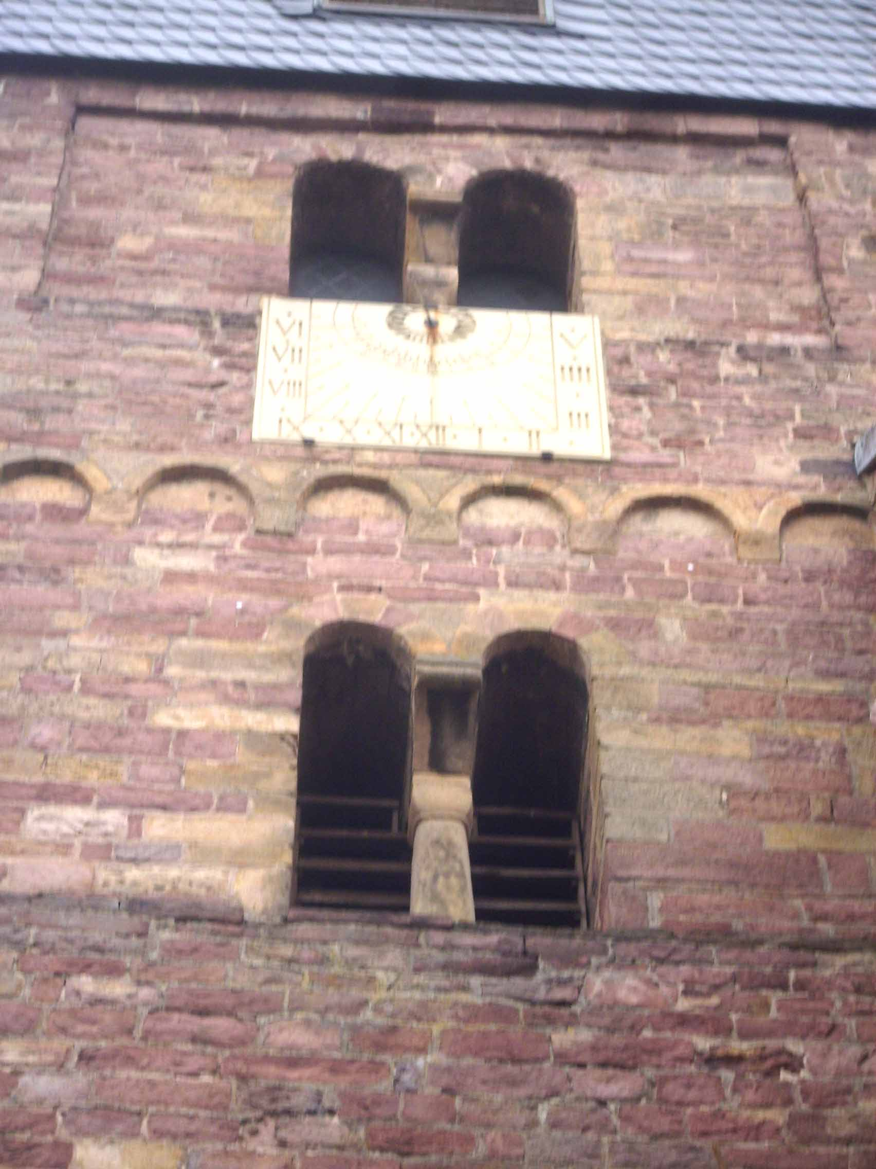 Grünwettersbach (Baden-Württemberg)-Kirchturm Südseite - Obergeschosse mit Biforien und Rundbogenfries